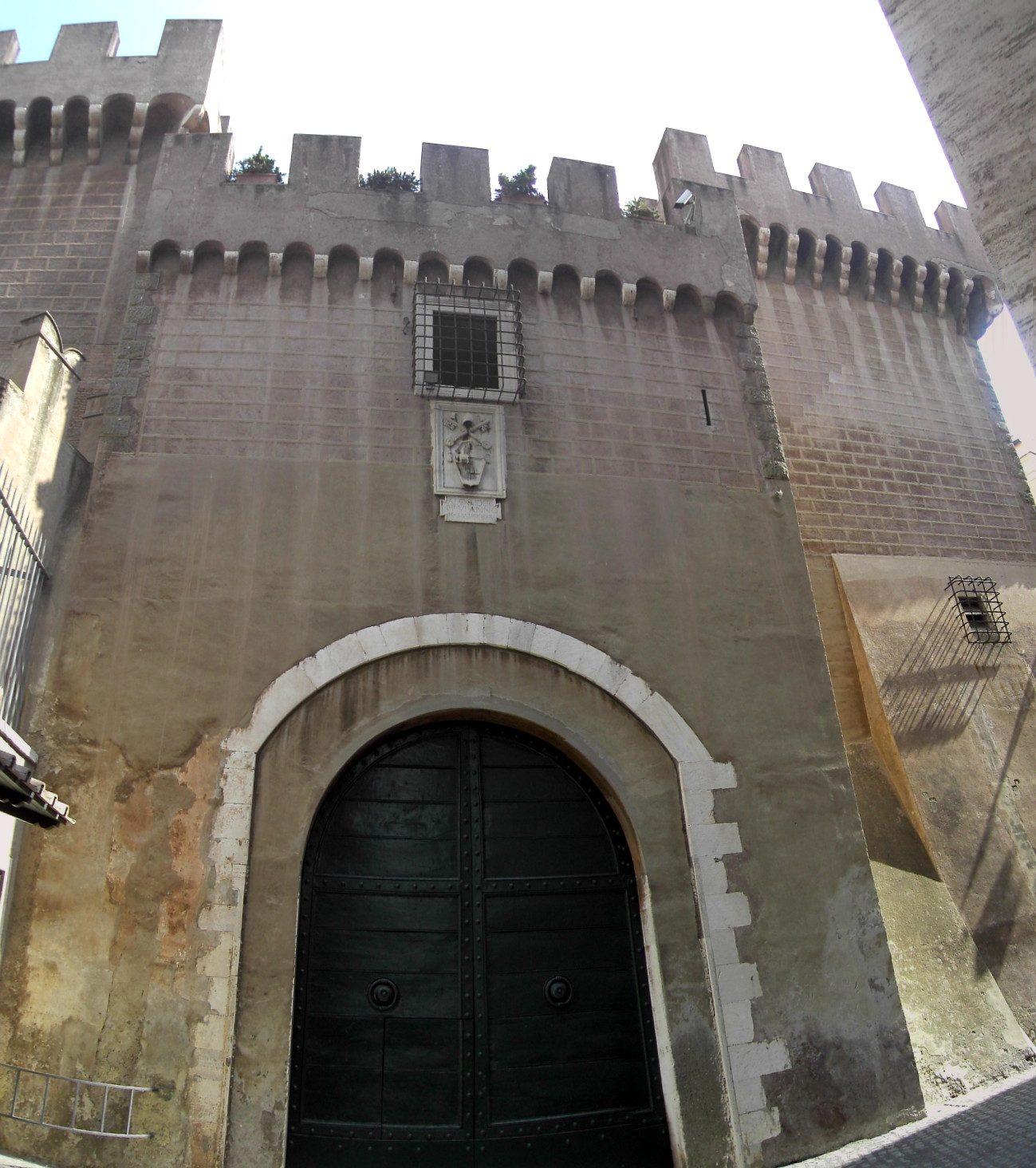 Roma, Mura Leonine: Porta San Pellegrino